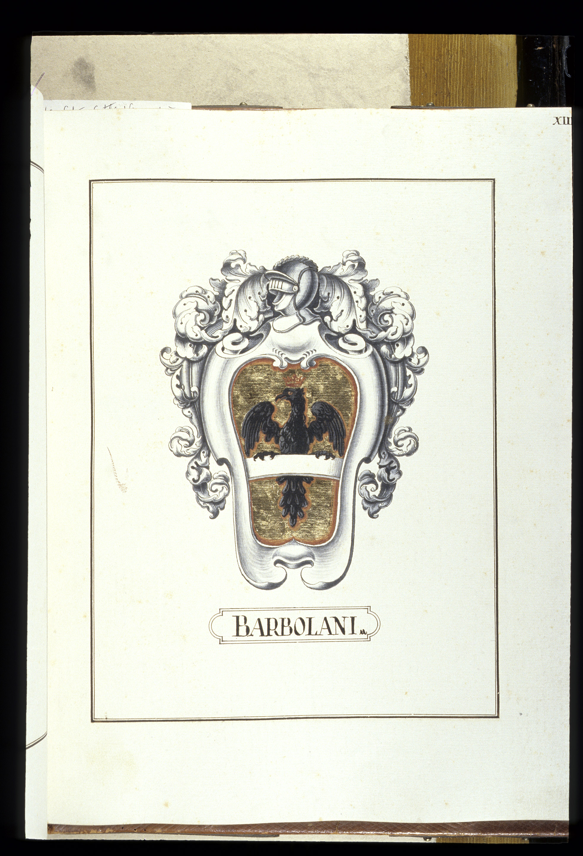 Stampa sec. IXX, stemma Barbolani in raccolta Ceramelli Papiani, Archivio di Stato, Firenze.